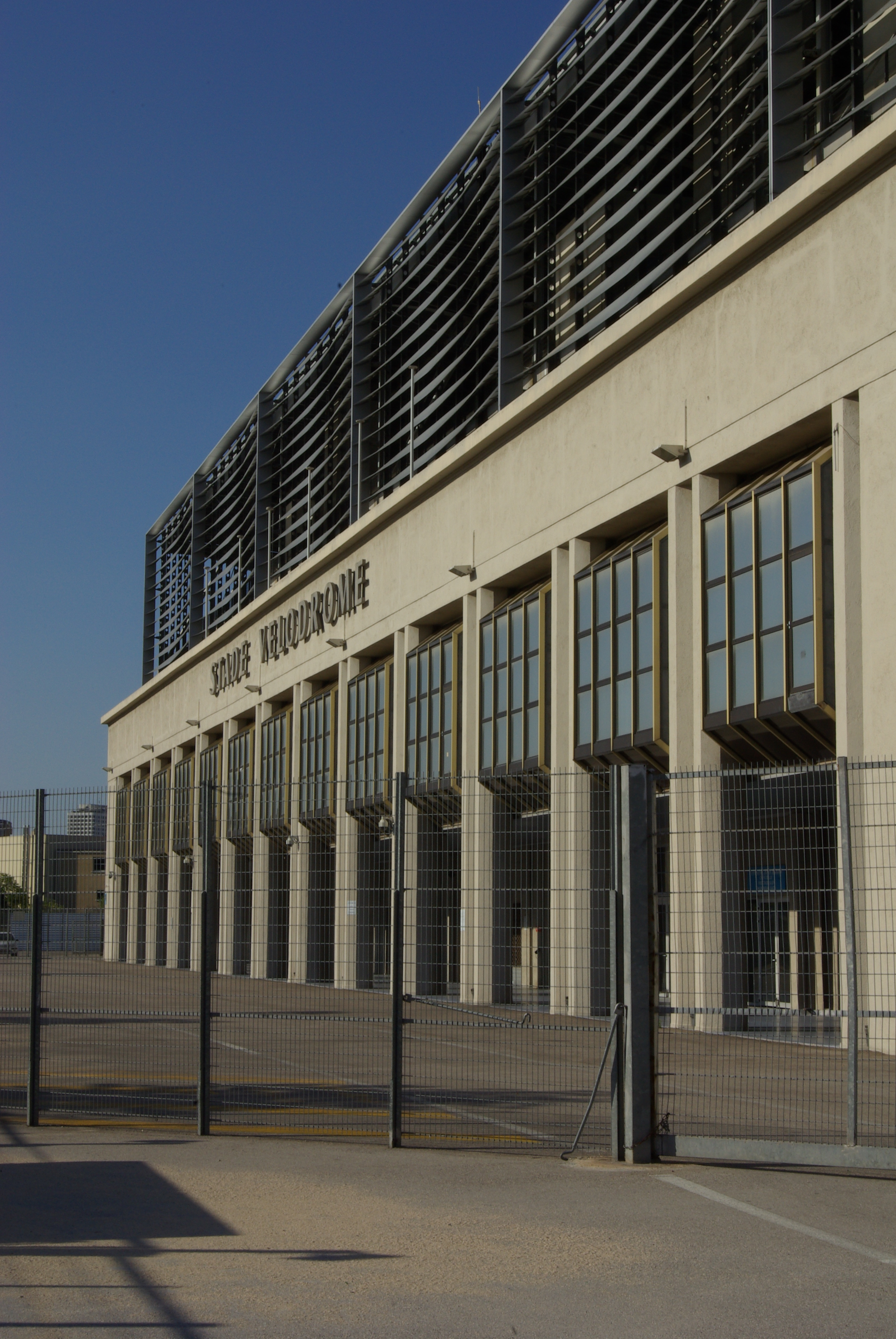 Façade du Stade Vélodrome